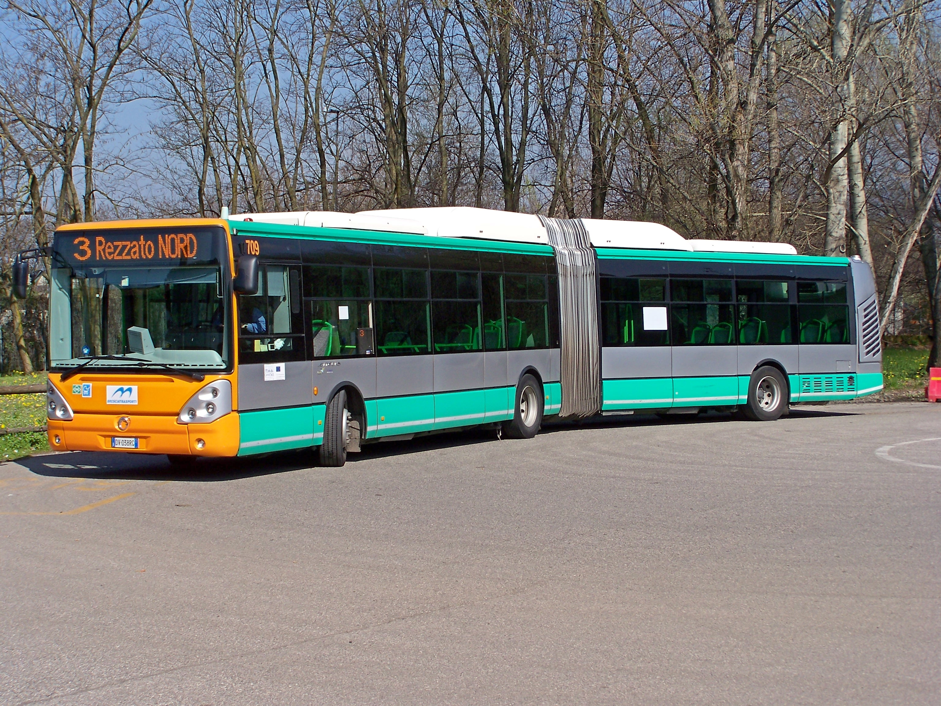 L'Irisbus Citelis nr. 709 di Brescia Trasporti al capolinea della Mandolossa della linea 3 al momento della partenza per Rezzato Nord